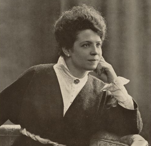 De Vlaams-Nederlandse actrice Magda Janssens